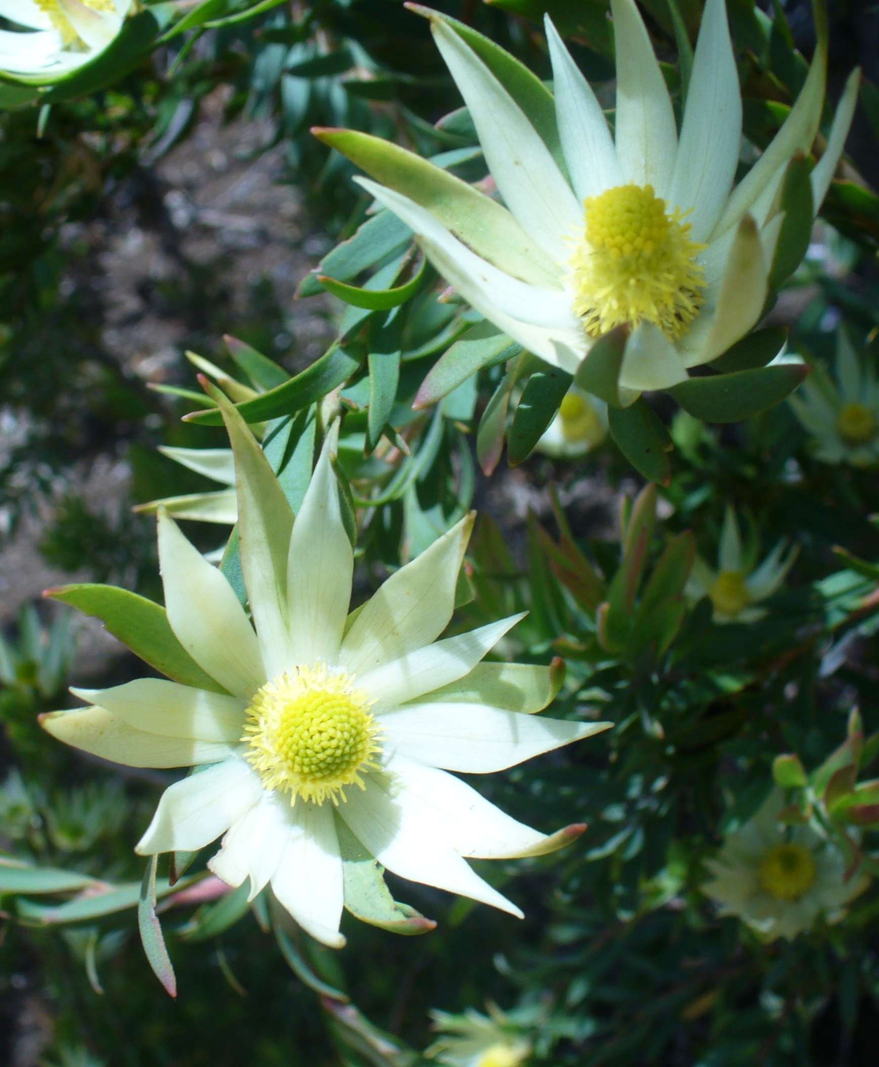 Leucadendron loriense — male flower.